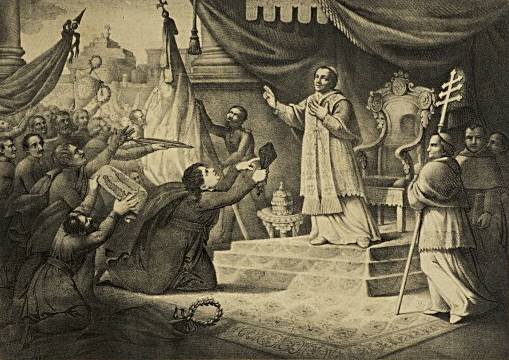 "Pio IX benedice i combattenti per l'indipendenza italiana" ridotto, litografia